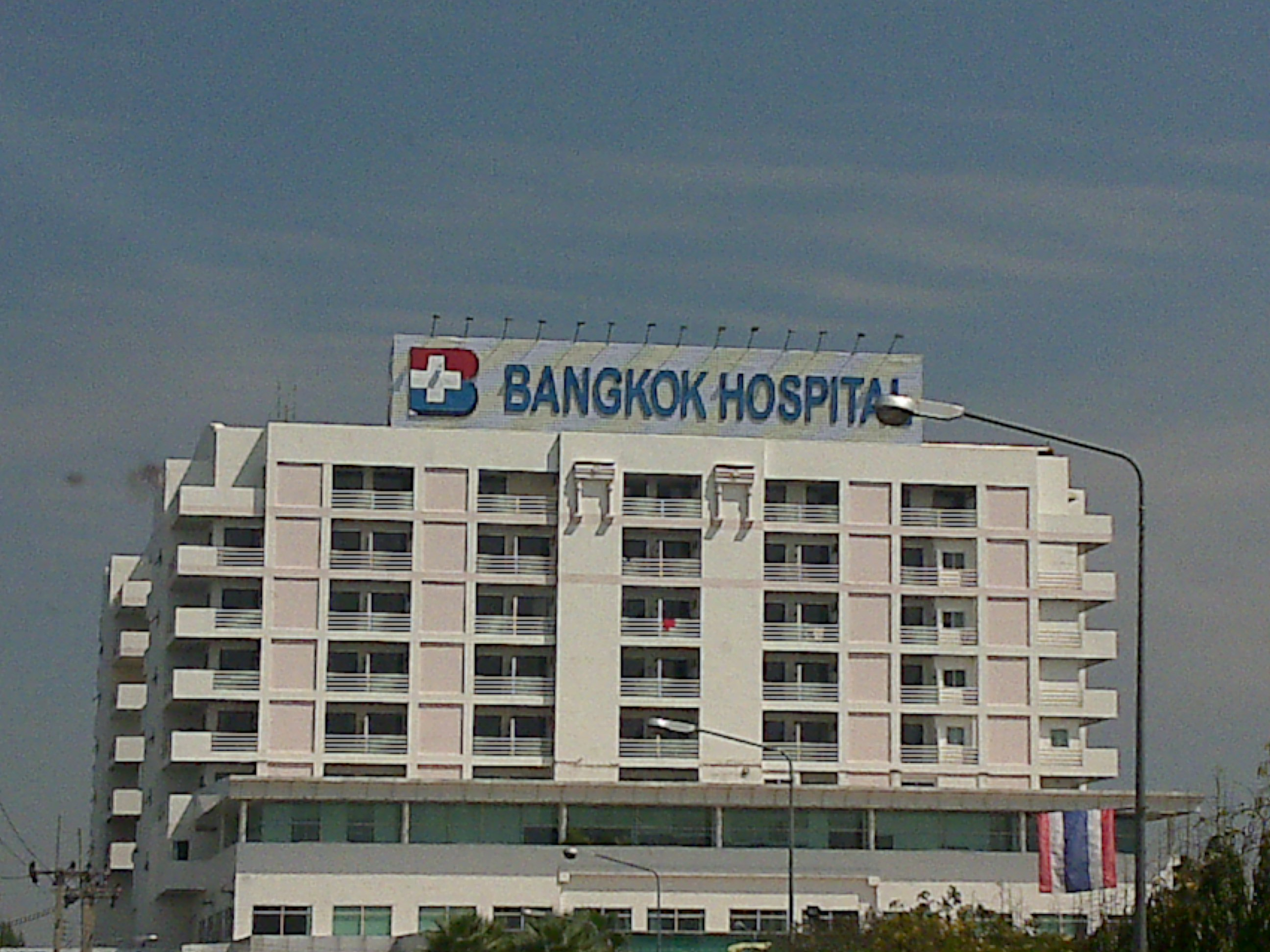 โรงพยาบาลกรุงเทพ จังหวัดนครราชสีมา